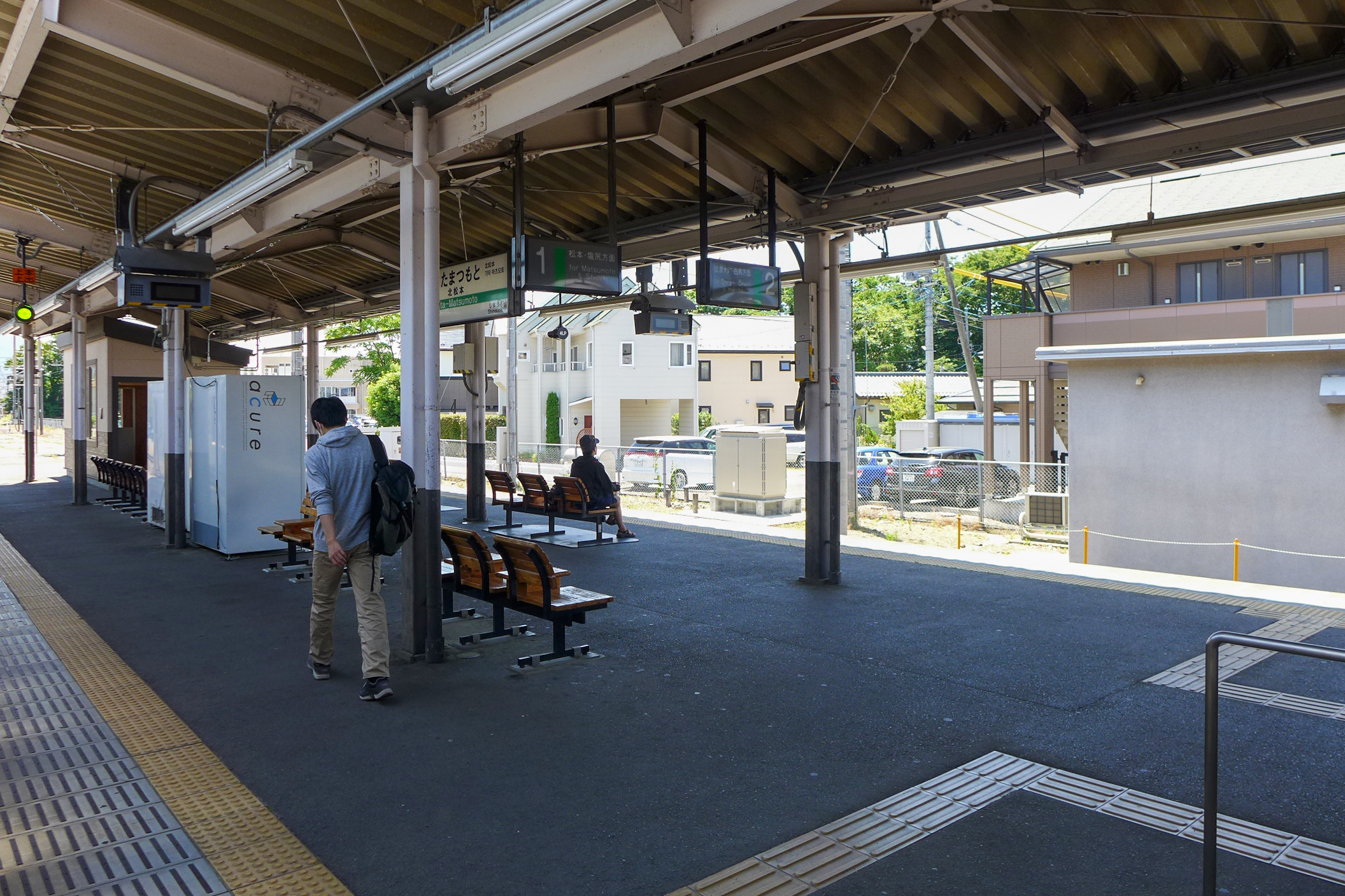 Kita-Matsumoto Station